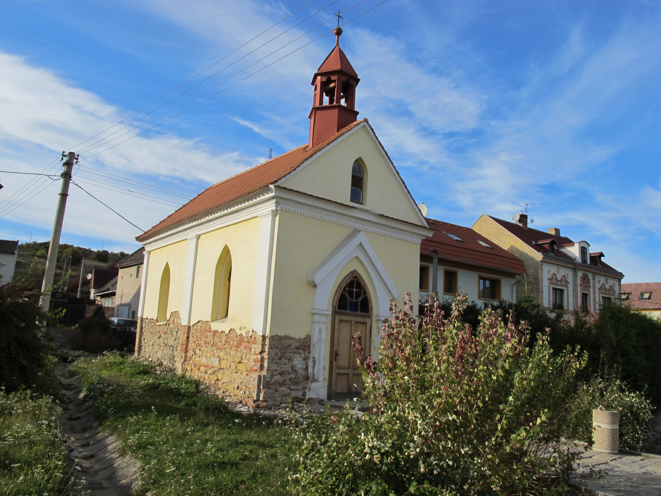 Kaple Nejsvětější Trojice (Obrnice), náves, Obrnice